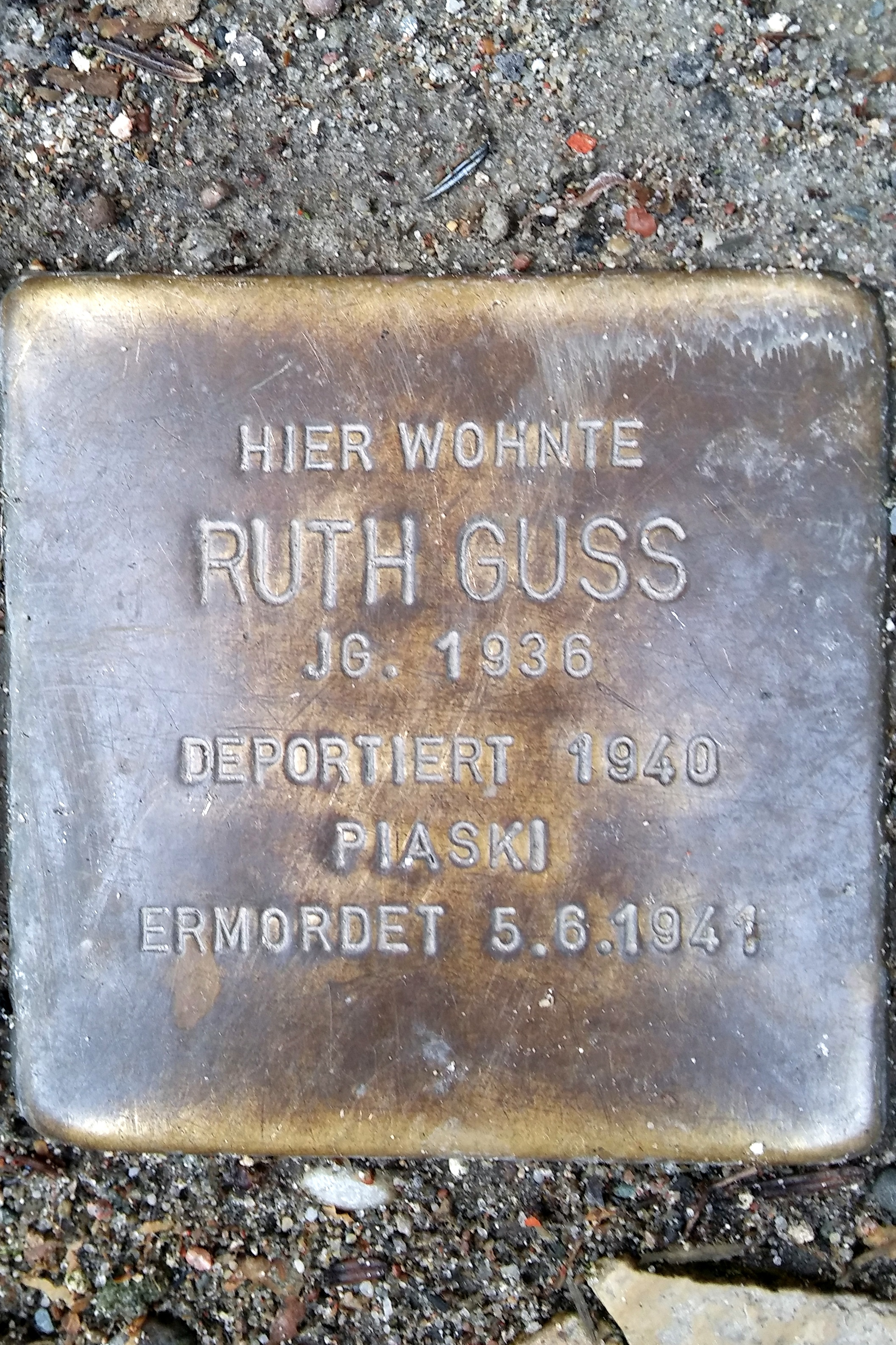 Stralsund, Badenstraße 41, Stolperstein Ruth Guss (2017-02-22)